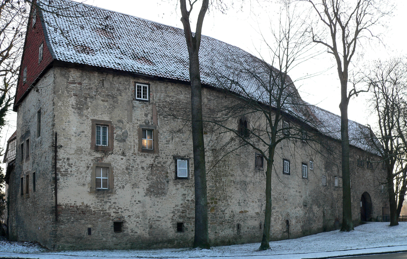 Burg Gebhardshagen Nordostseite